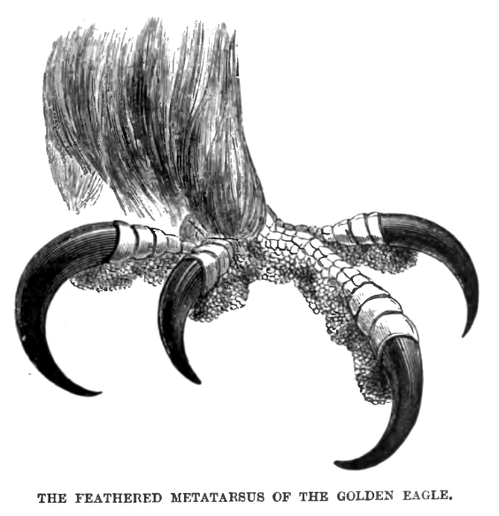 Golden eagle (Aquila chrysaetos) foot